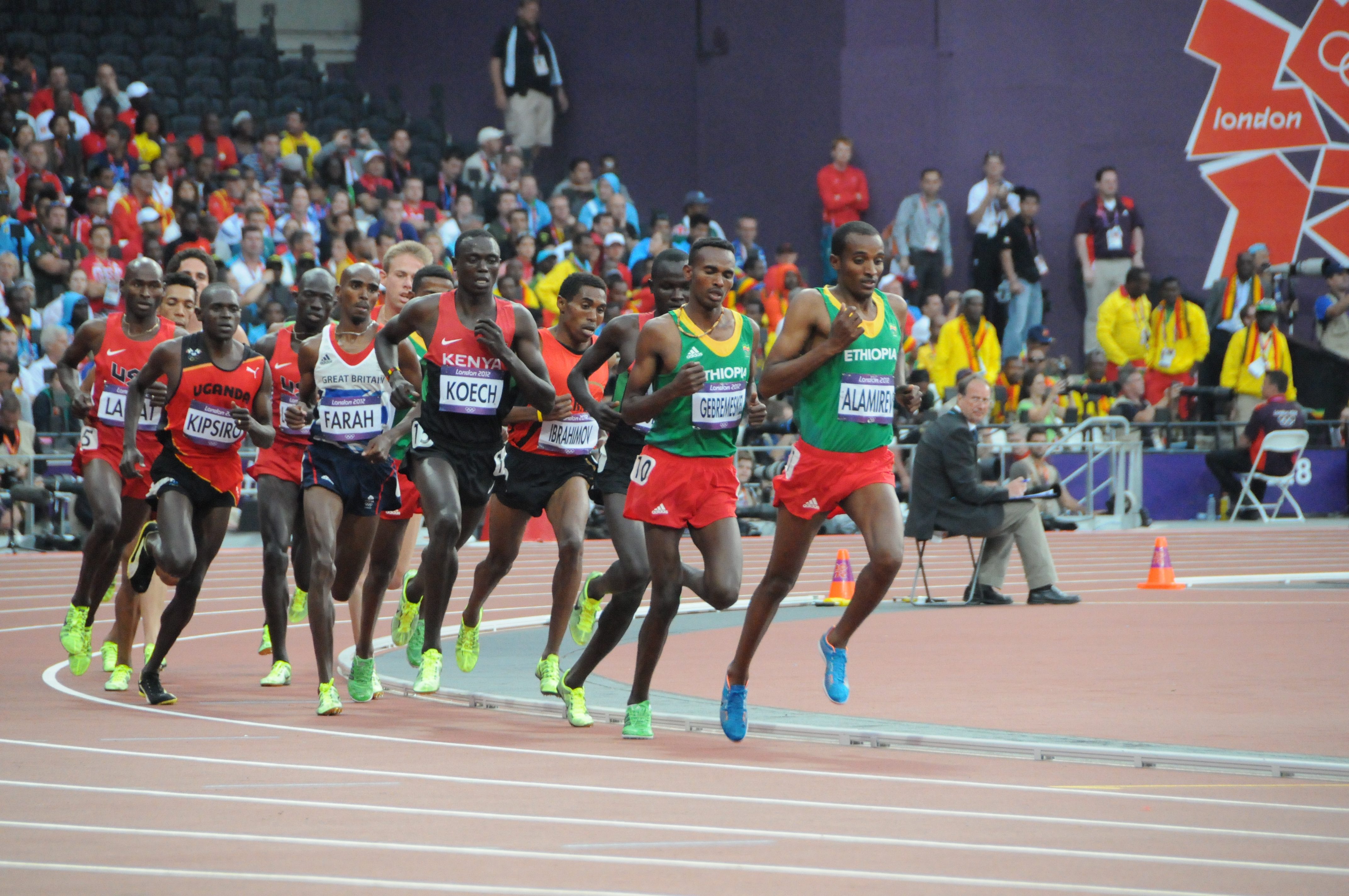 Course du 5000m des jeux olympique de Londres